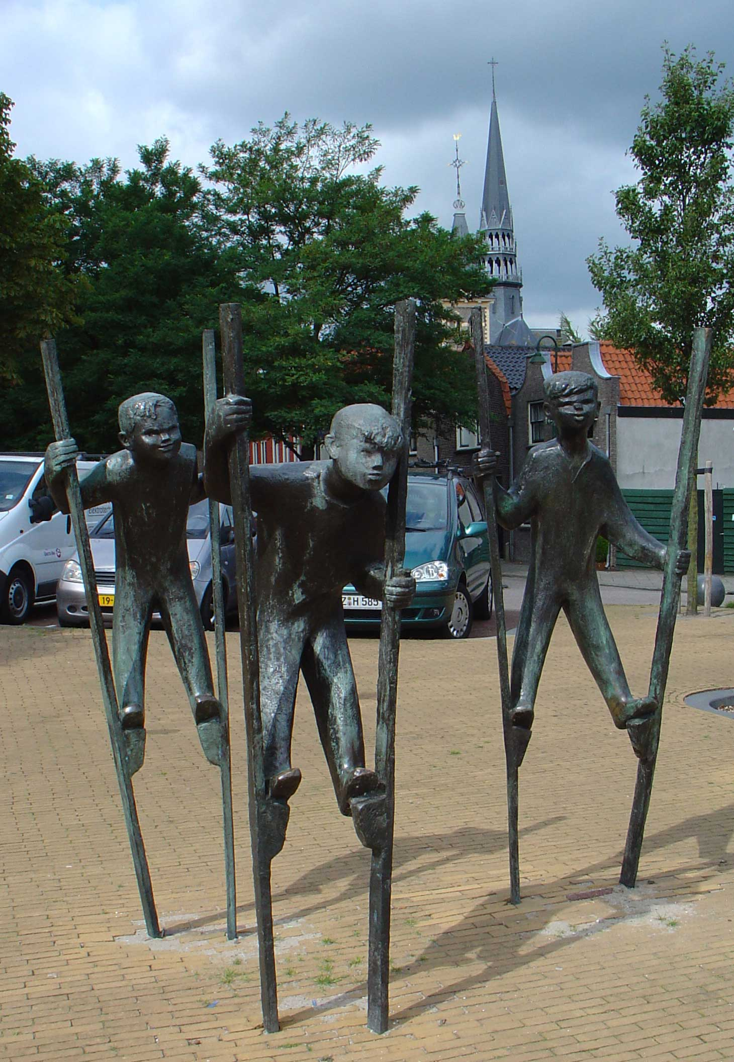 De steltlopers (1972,) brons, door Lies Ketterer (1905) - Bogen Gouda